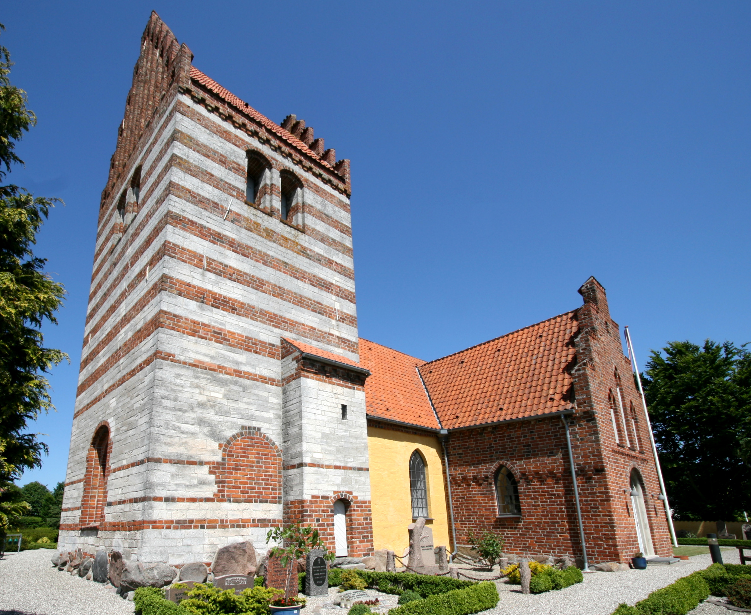 Ølsemagle Kirke, near Køge, Denmark. From southwest.